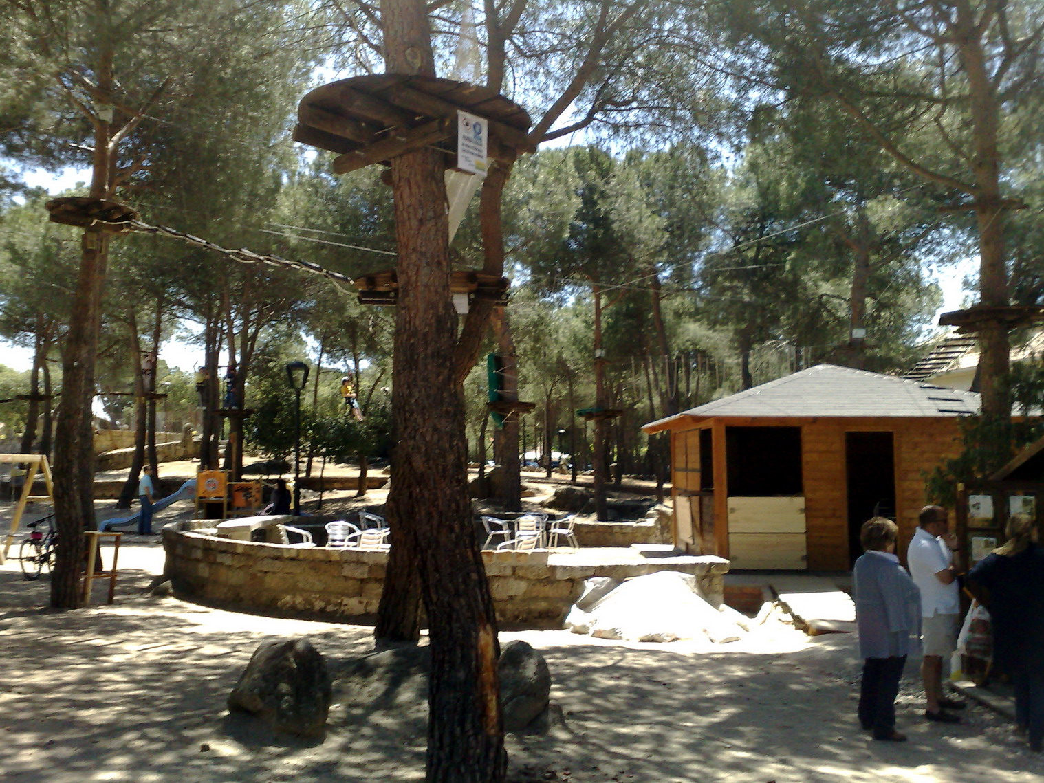 Torrelodones. Parque JH. Circuito multiaventura.